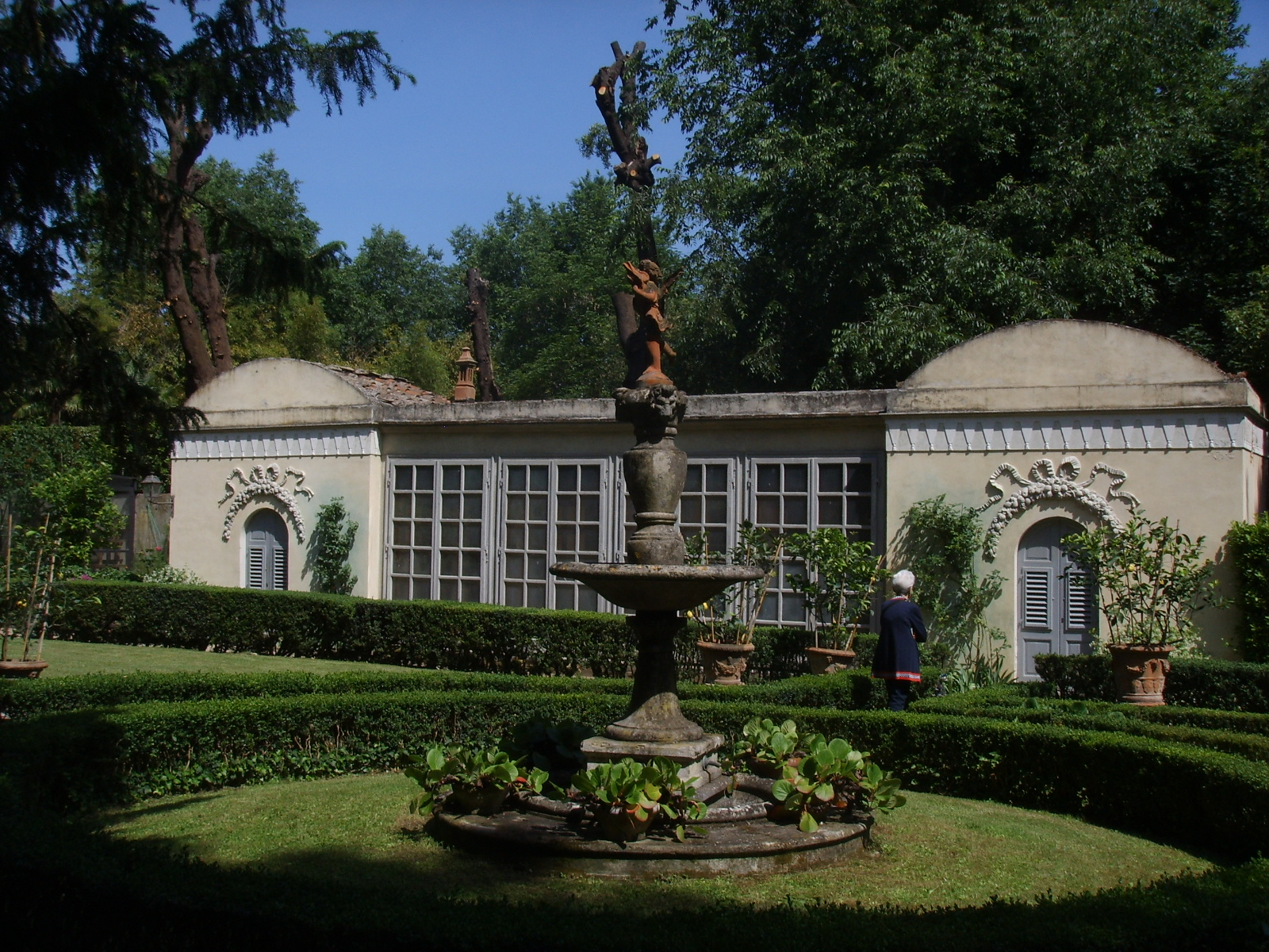 see fileneme